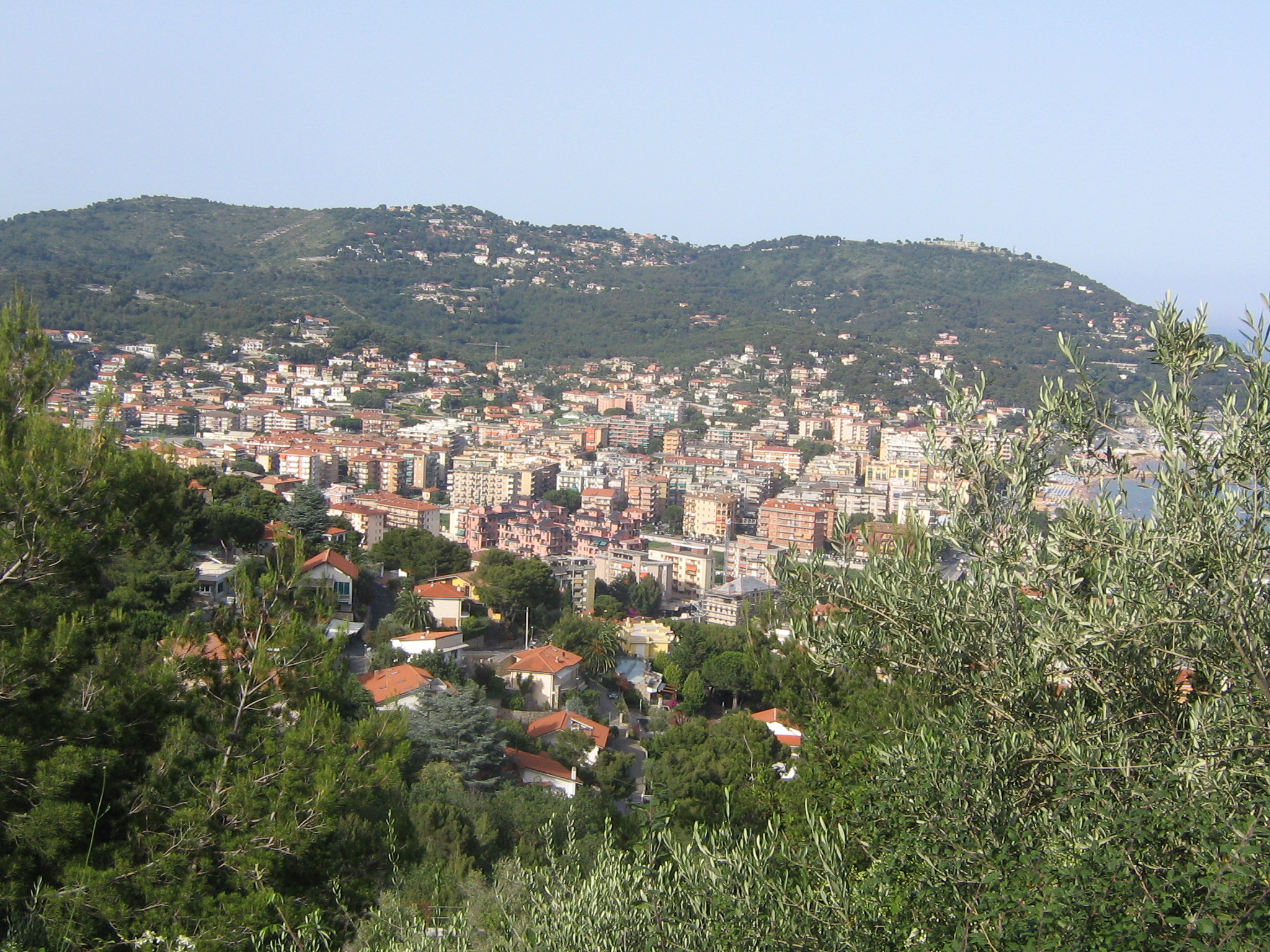 Andora vista da Rollo